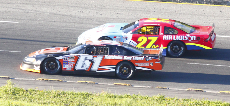 Voitures Super Late Model de la série PASS North. 61: Marc-André Cliche - 27: Alexandre Gingras. Autodrome Chaudière - 18 mai 2013 - Photo Paul-Émile Poulin-Jacques